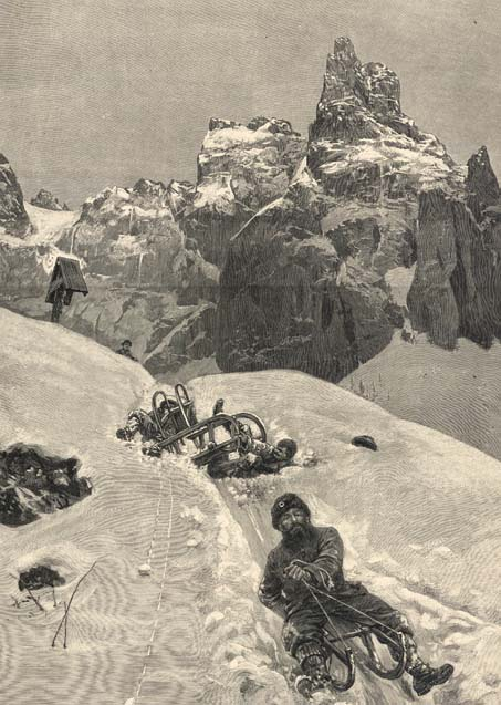 Rodelfahrt. Holzstich nach fotografischer Aufnahme von Emil Terschak